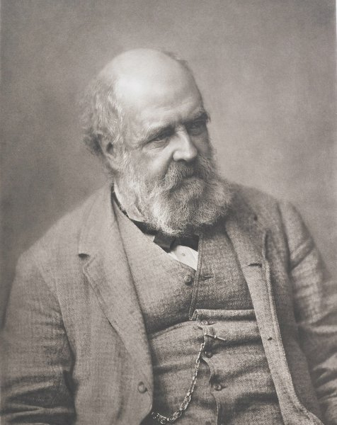 Эдвард Армитаж (1817—1896) — один из лучших английских исторических жанровых живописцев